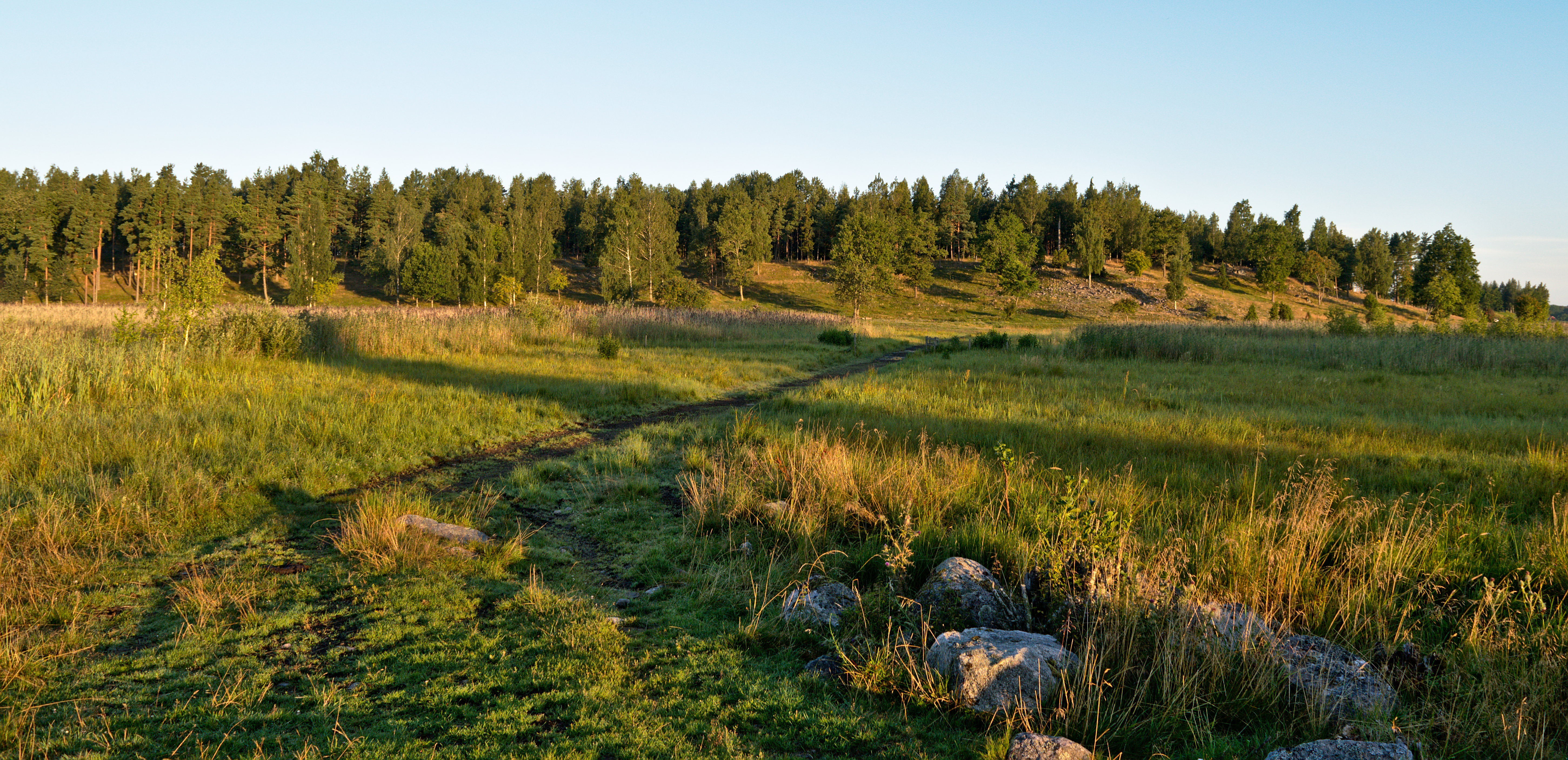 Söderfjärdens naturreservat i Eskilstuna kommun. Åsen med vägen ut mot Koholmen, sett från Koholmen.